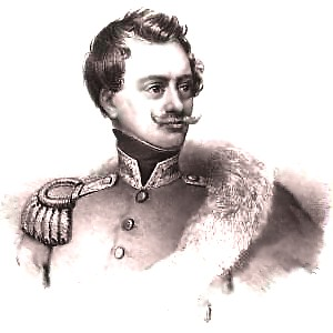 Ignacy Prądzyński, anonymous plate before 1850, probably c.1831